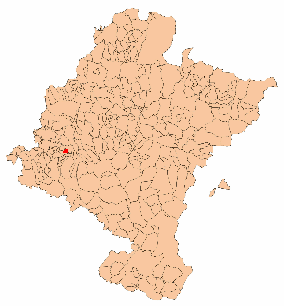 Origen: es::Commons:Image:Navarra - Mapa municipal.svg